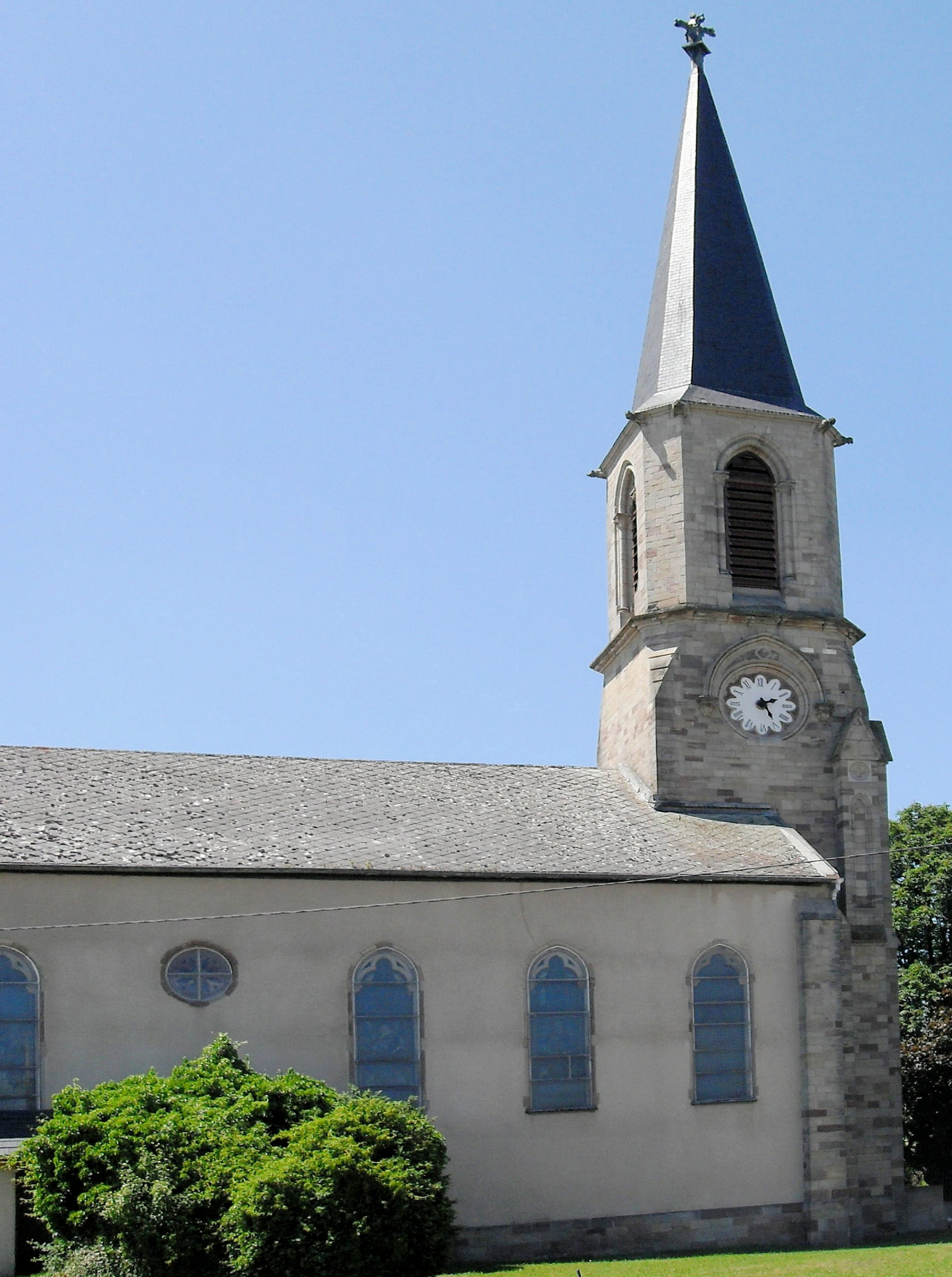 L'église Saint-Léger à Manspach